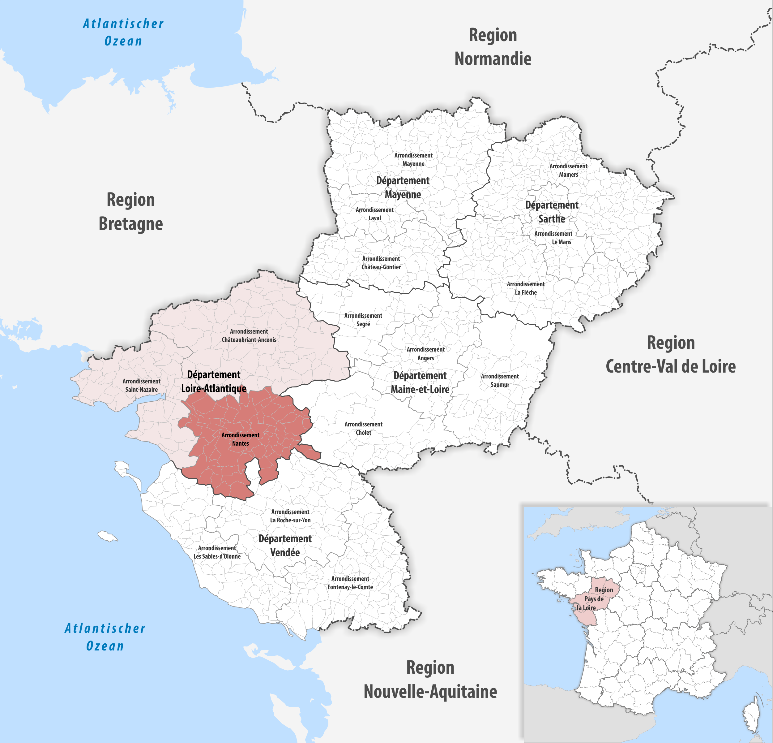 Lage des Arrondissements Nantes